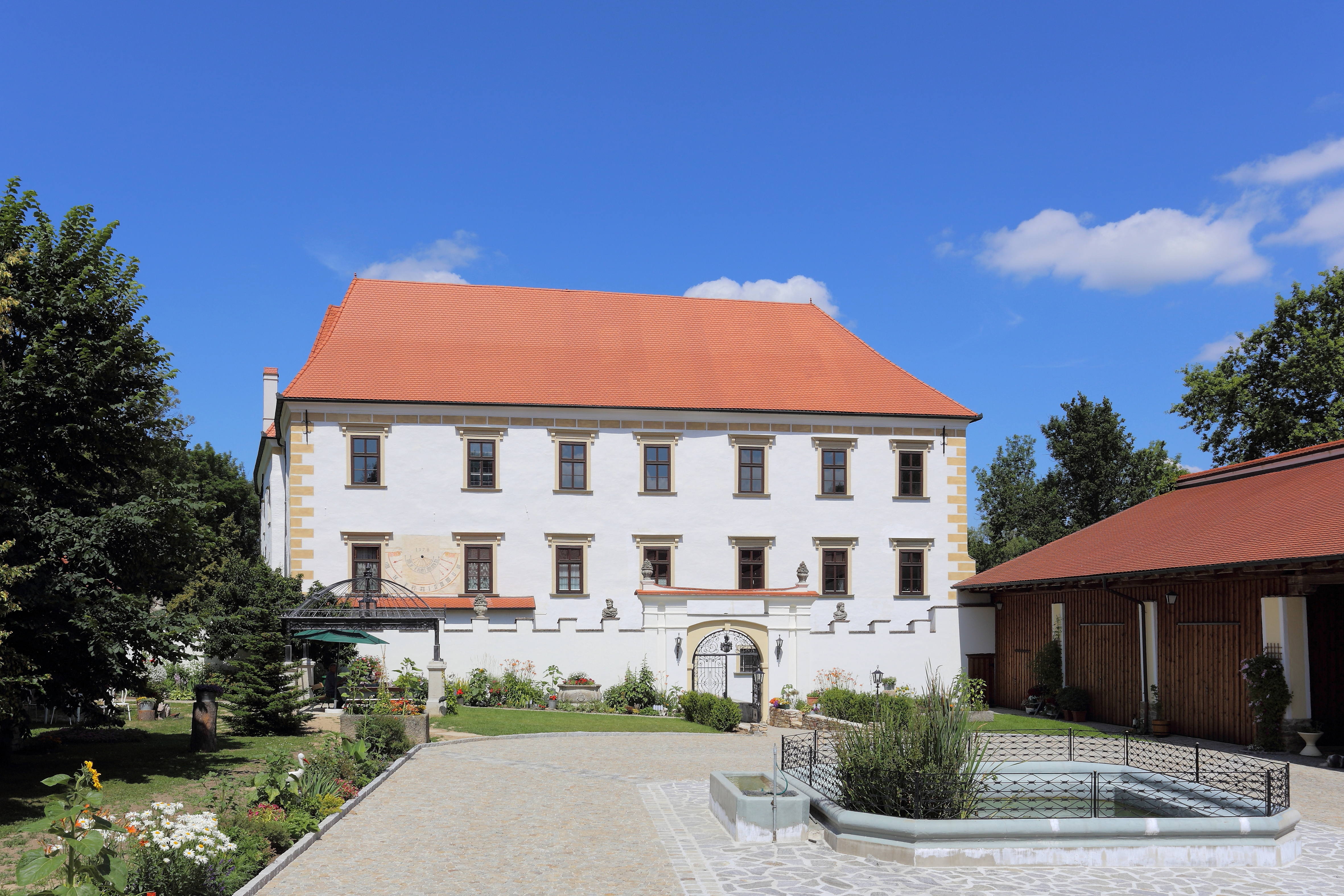 Schloss in Drösiedl, ein Ortsteil der niederösterreichischen Marktgemeinde Ludweis-Aigen. Ein ehemaliges vierflügelige Renaissance-Wasserschloss.